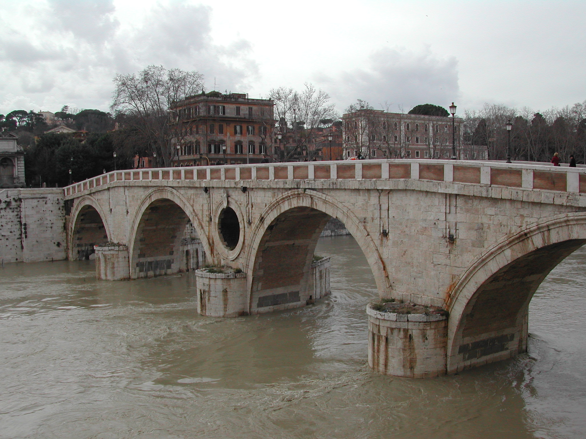 Roma, Tevere: Ponte Sisto